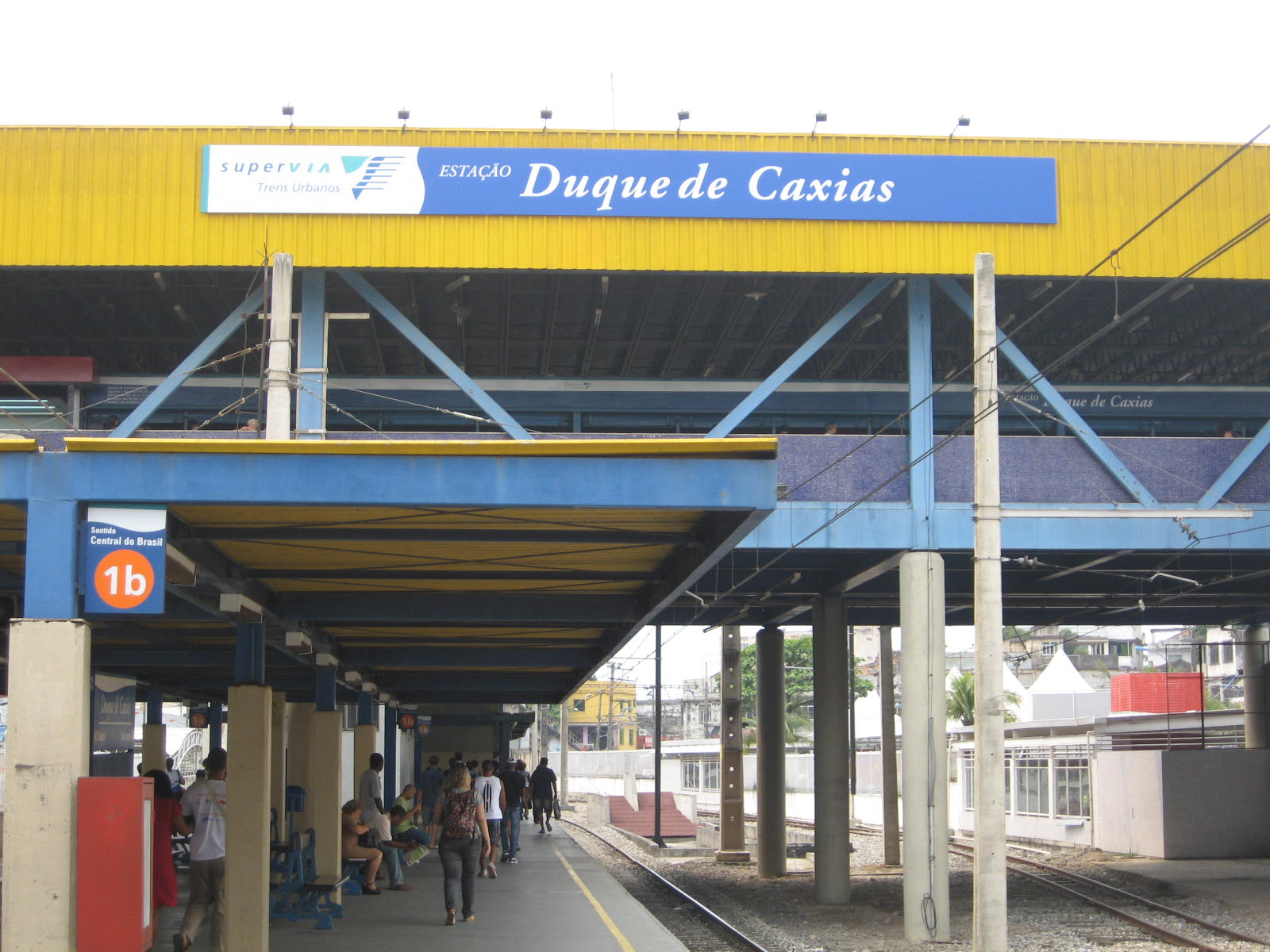 Estação Ferroviária Duque de Caxias, localizada no Rio de Janeiro.